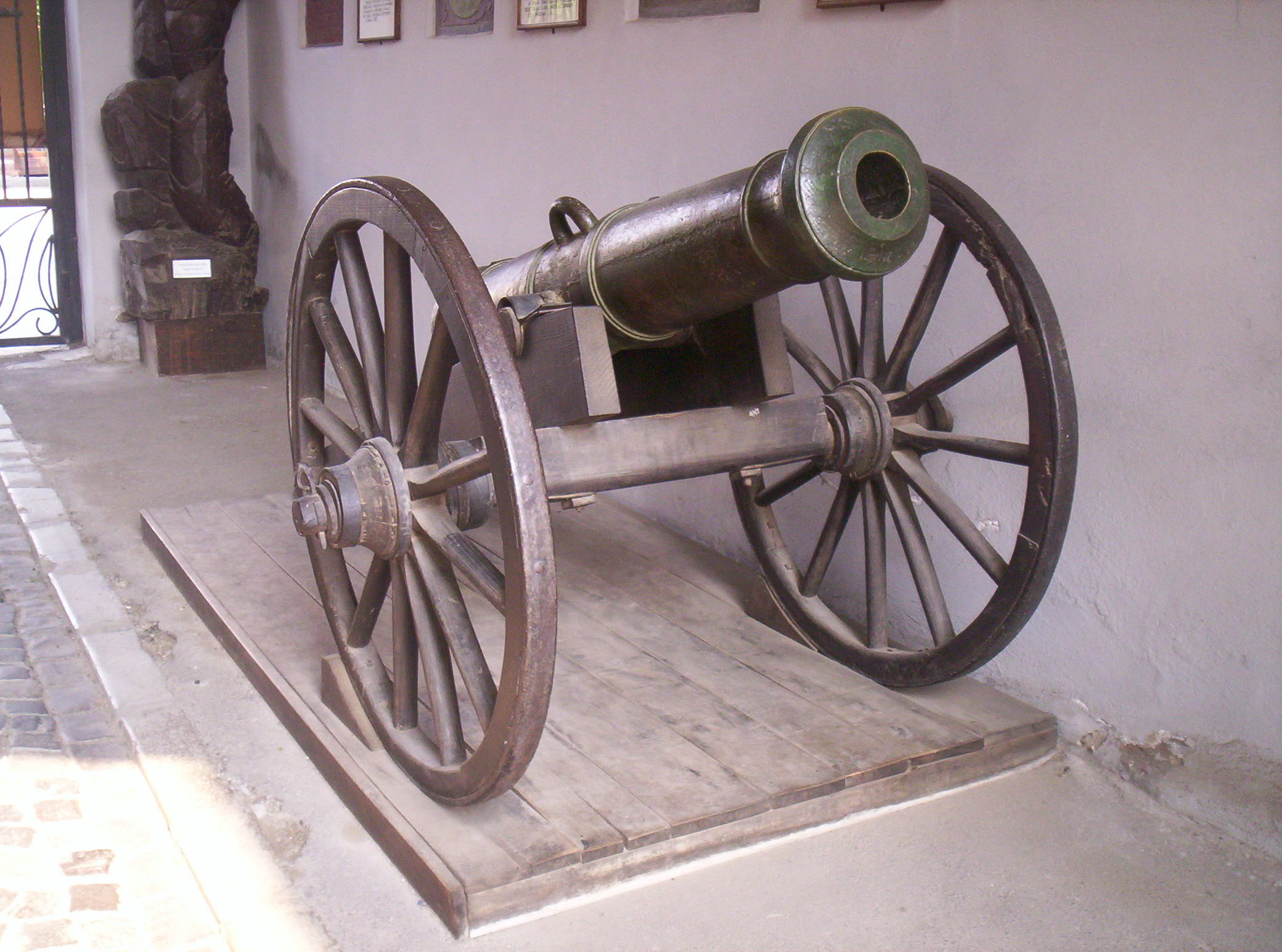 A Gábor Áron műhelyében készült ágyúk egyetlen fennmaradt példányáról készült másolat a kézdivásárhelyi Céhtörténeti Muzaumban – photo taken by uploader User:Csanády in 2006.